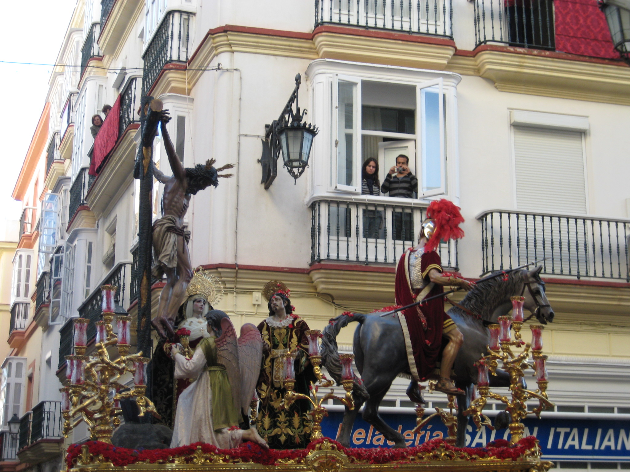 Fotografía propia realizada por LUIS REY.